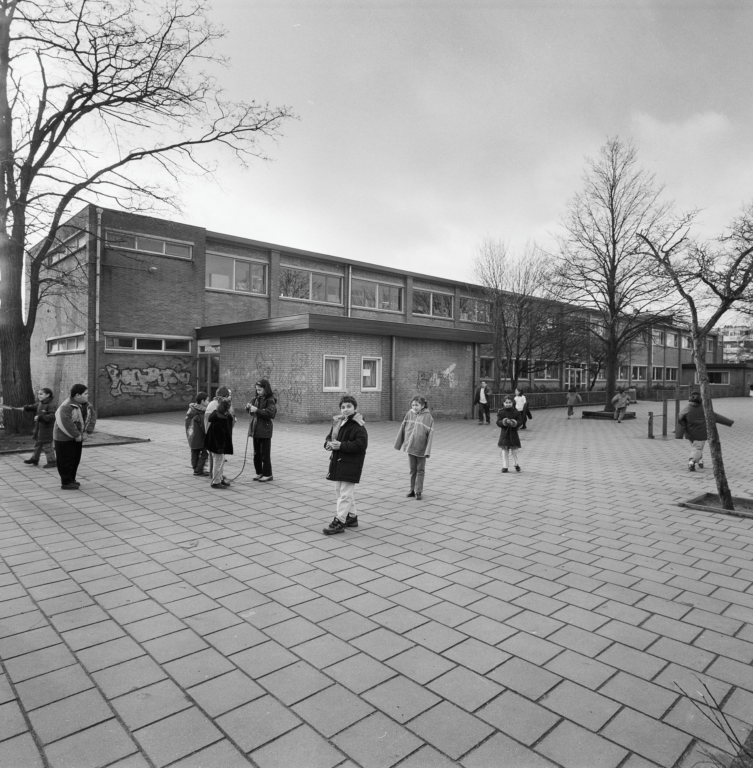 Basisschool De Zeven Gaven: Overzicht met schoolplein